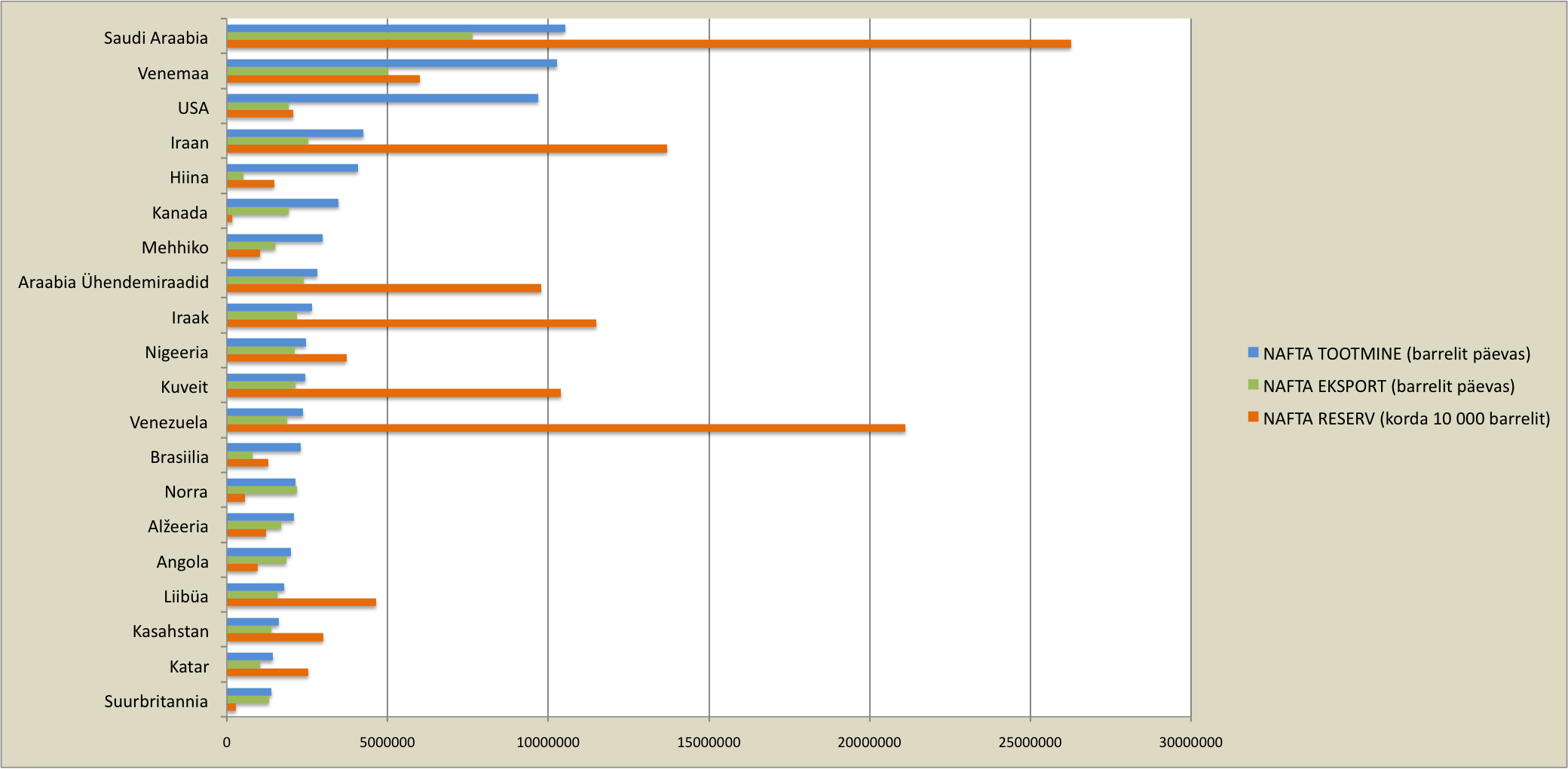 20 maailma suurimat nafta tootja ekspordi, reservvarude ja tootmise hulk.